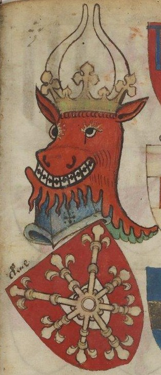 Stammwappen der alten Grafen von Kleve.